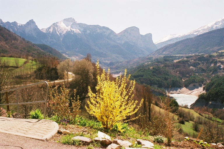 Le Dévoluy vu depuis Ambel (Isère).